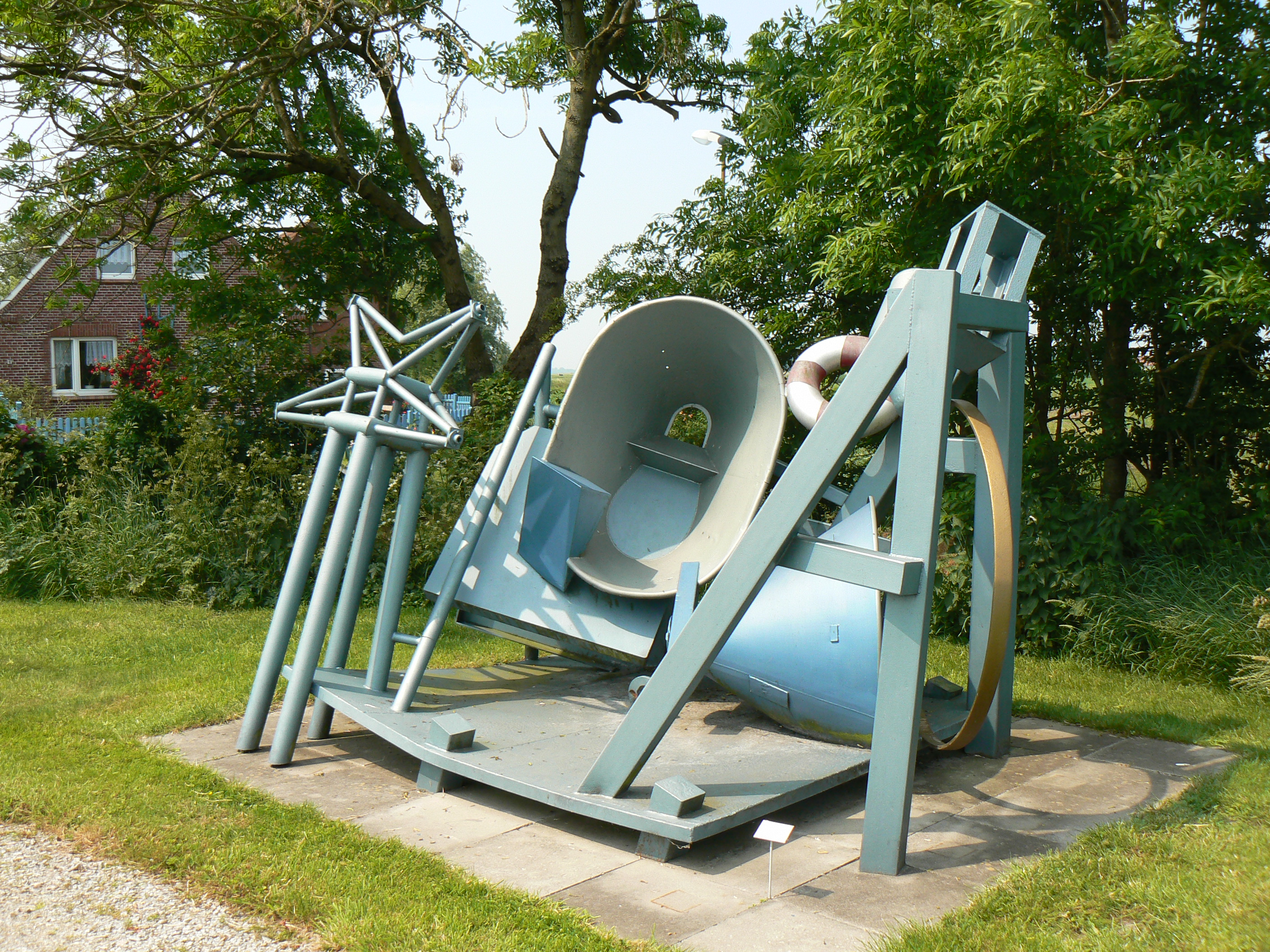 sculpture D.L. Thompson in Sculpture Park Funnix